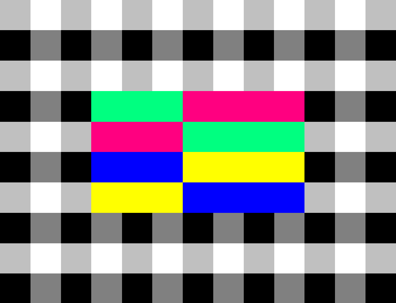 Eén van de eerste kleurentestbeelden die door de Nederlandse Publieke Omroep zijn gebruikt. Deze afbeelding is getekend met Paint.